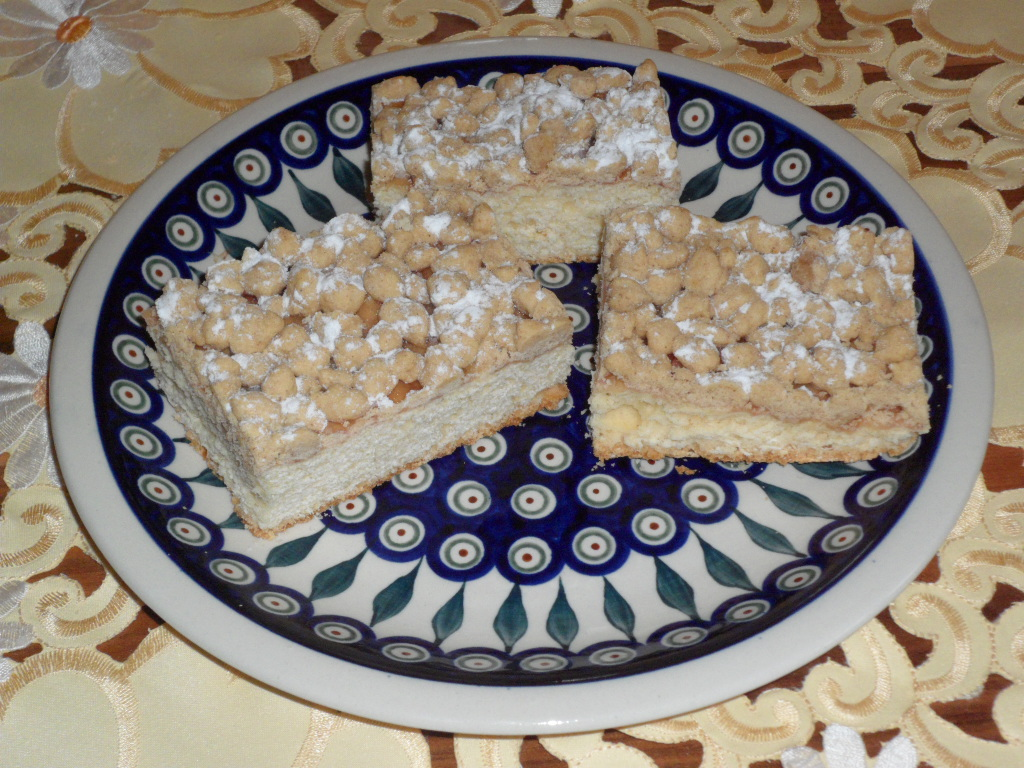 Schlesischer Streuselkuchen Schläsch: Schläscher Sträselkucha